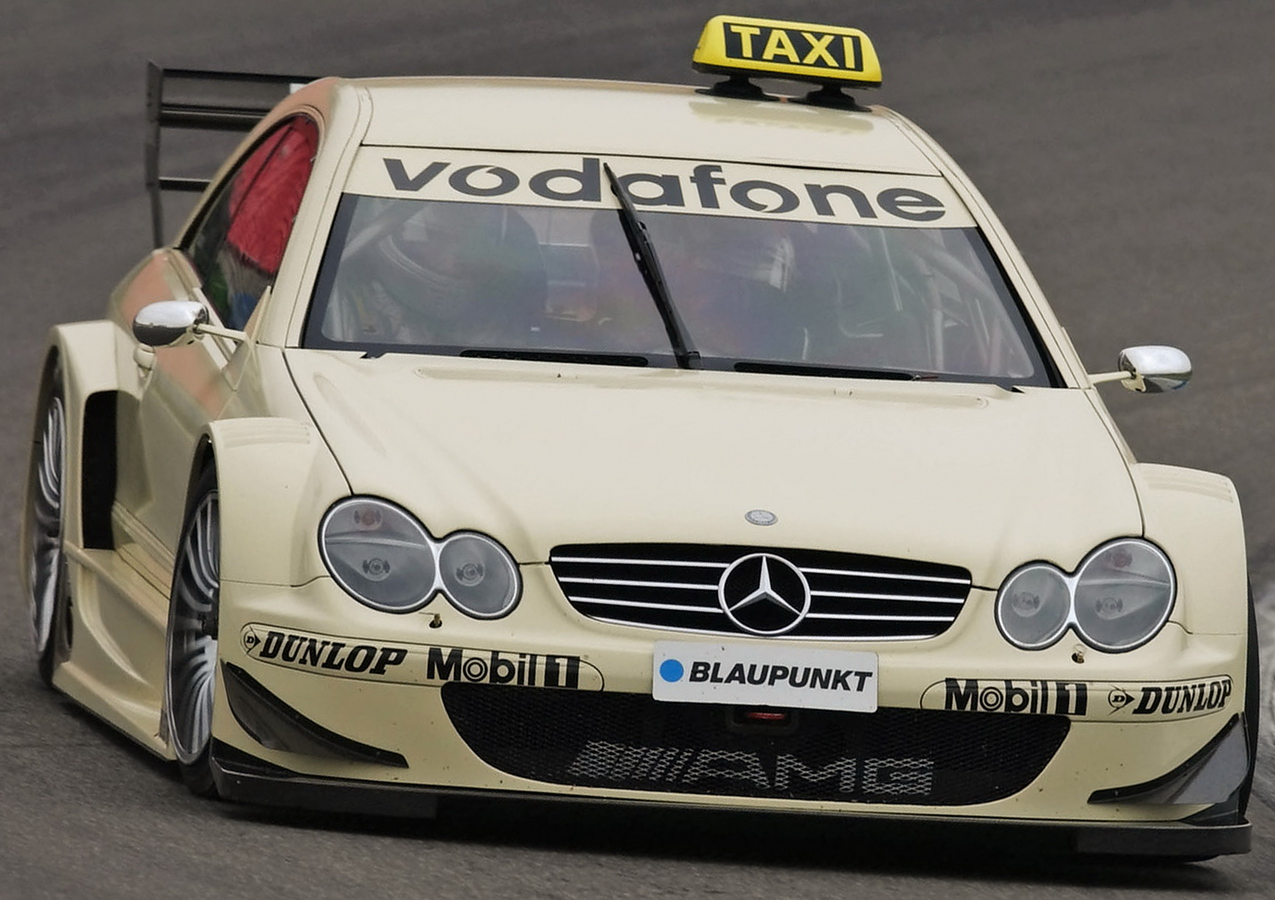 DTM-Tourenwagen von Mercedes-AMG als Taxi / 2004 Mercedes-Benz CLK DTM AMG - Race Taxi (Original text: Des Einstellers: Renntaxi wörtlich genommen: Bernd Schneider chauffiert vier Tage vor dem spannenden Finale der DTM in Hockenheim Gäste im stilgerecht lackierten AMG-Mercedes CLK um die Rennstrecke)